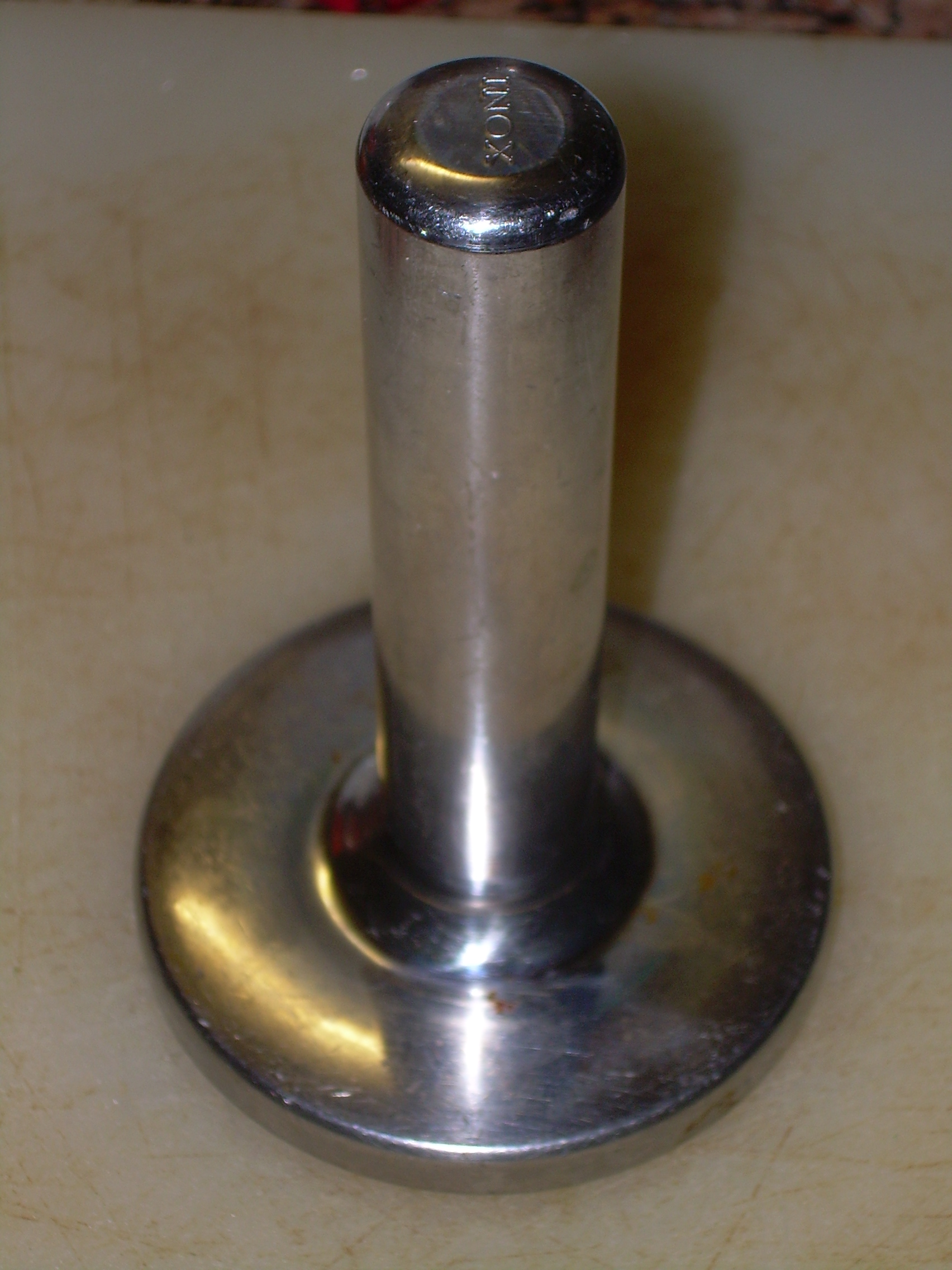 Tipico pestacarne o batticarne in acciaio inox.